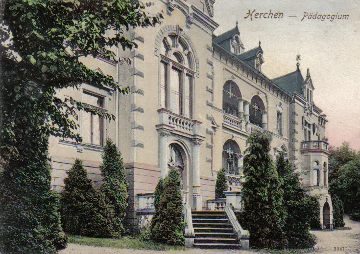 Pädagogium in (Windeck-) Herchen